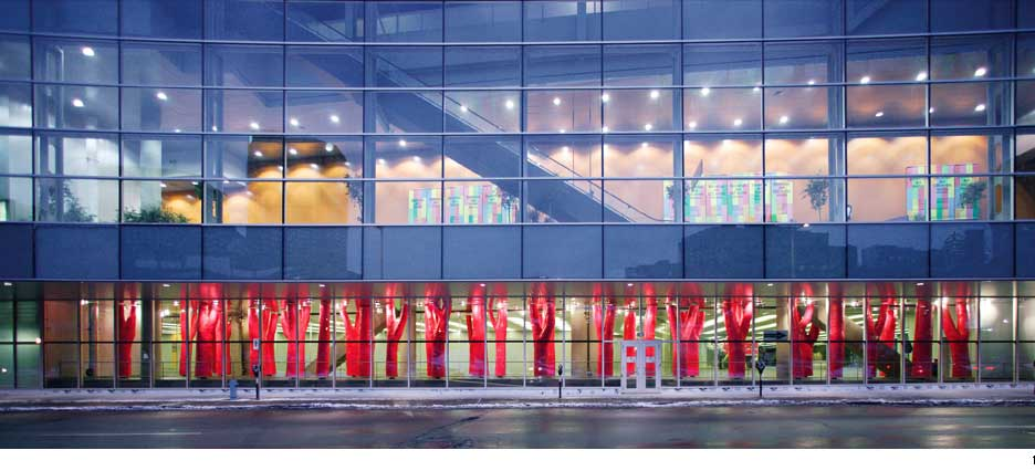 Nature légère, sculpture de Claude Cormier au Palais des congrès de Montréal.